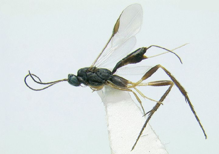 Aneurobracon sp.